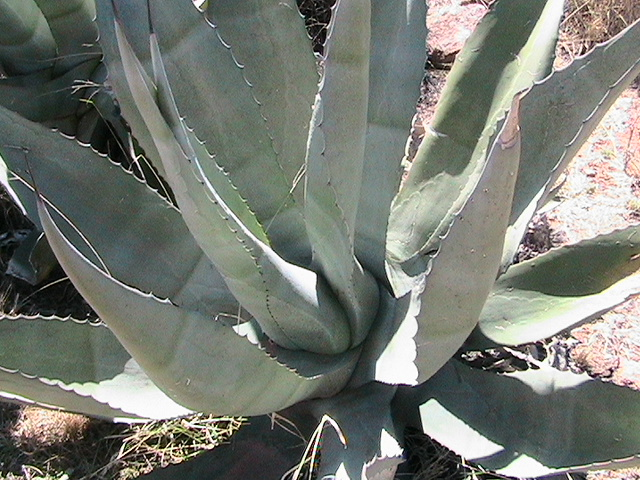 Maguey en el estado de Zacatecas. Tomado en las afueras de